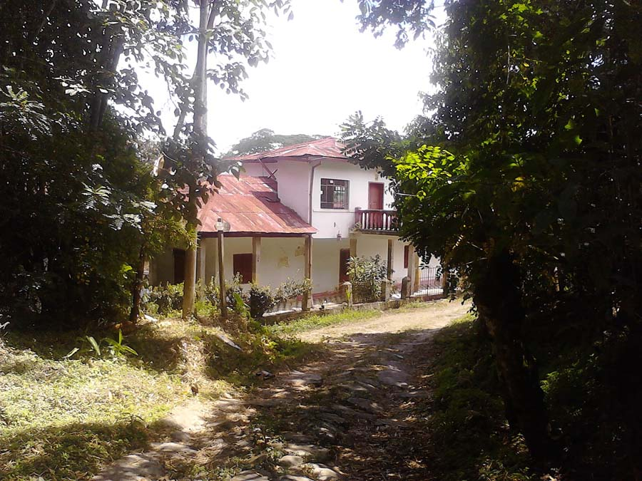 Antigua casona del presidente Alvaro López ubicada en La Mesa Cundinamarca. Paseo a La Esperanza.